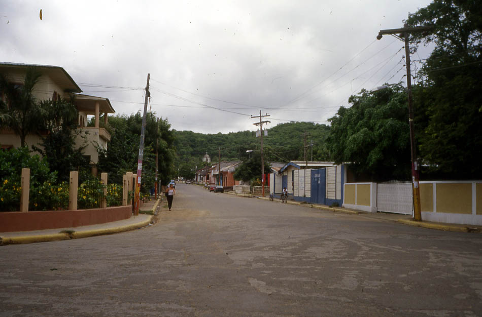 Calle de San Juan del Sur (Nicaragua). 2002